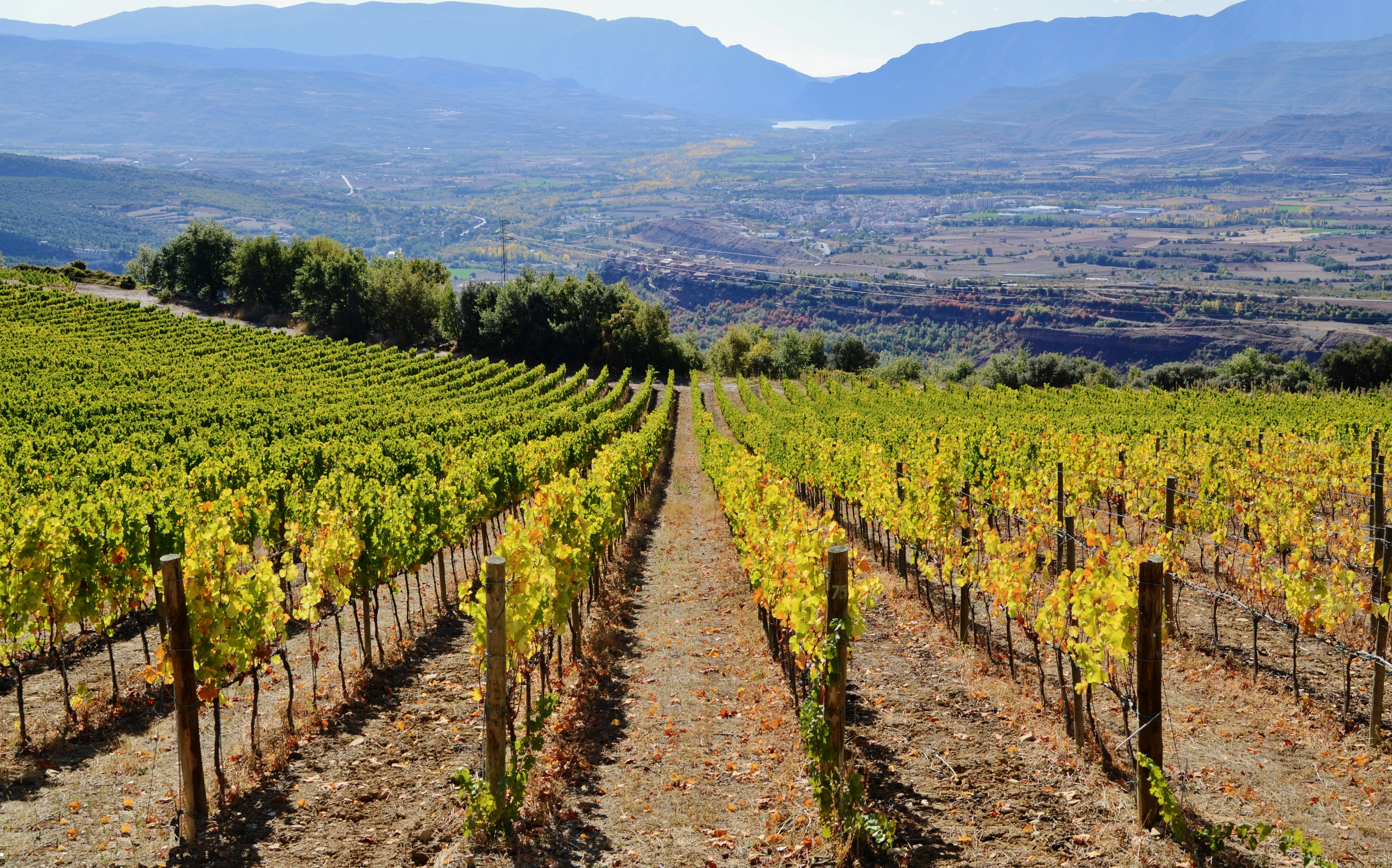 Vinyes de Castell d'Encus, Talarn, Costers del Segre